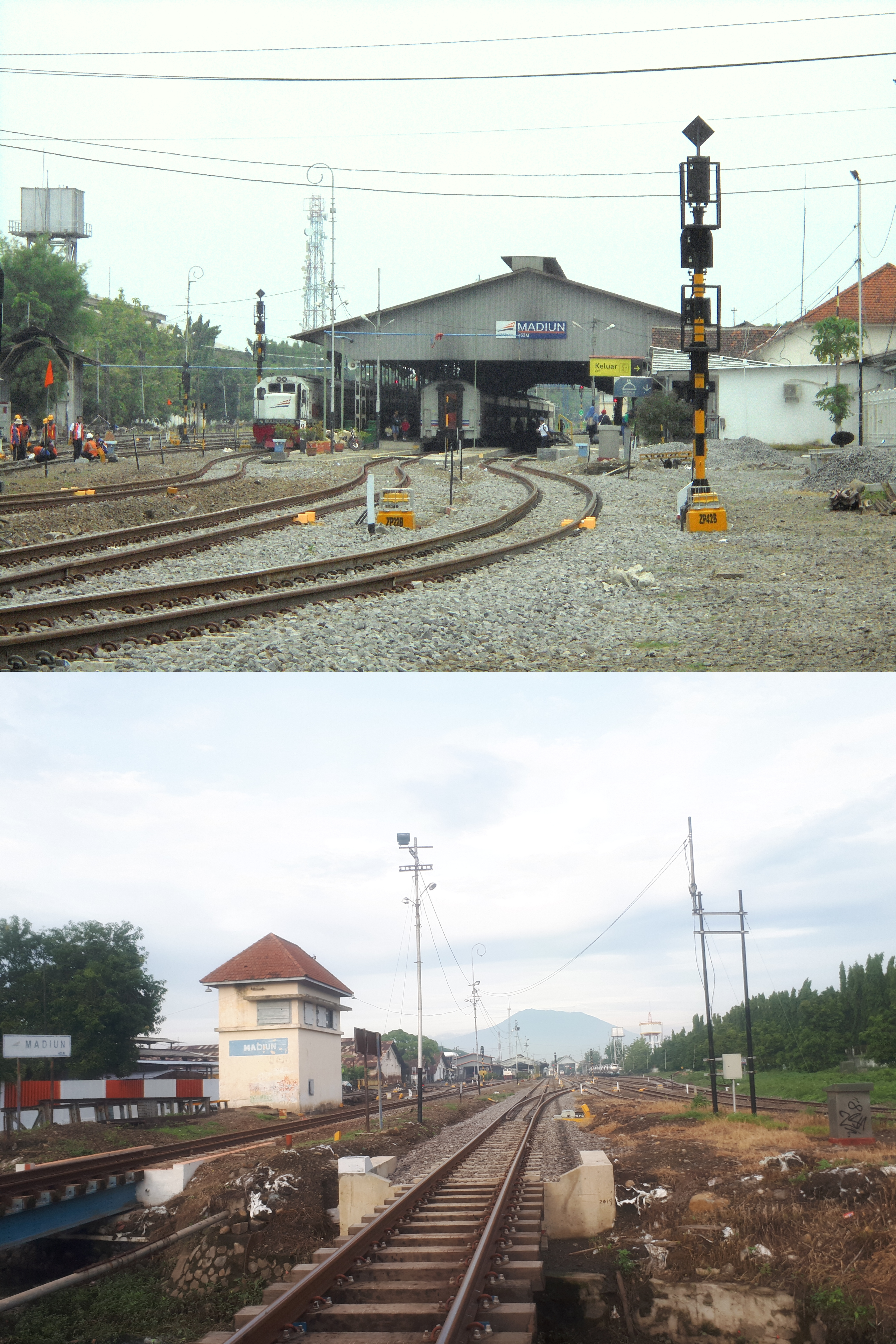 Emplasemen Stasiun Madiun dari sisi barat (atas) dan sisi timur (bawah), disajikan secara menurun